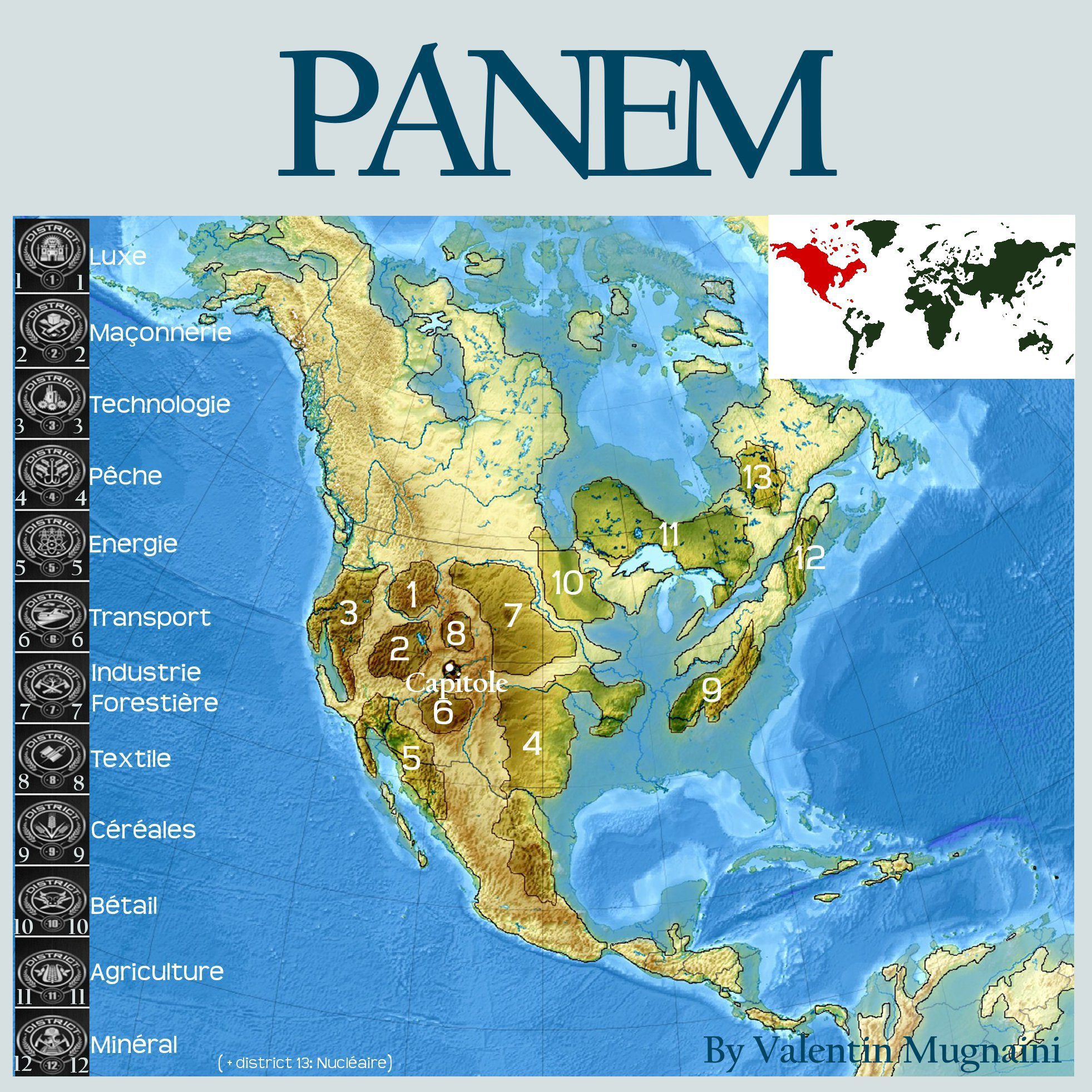 Carte représentant le pays fictif de Panem, mentionné dans les livres Hunger Games.